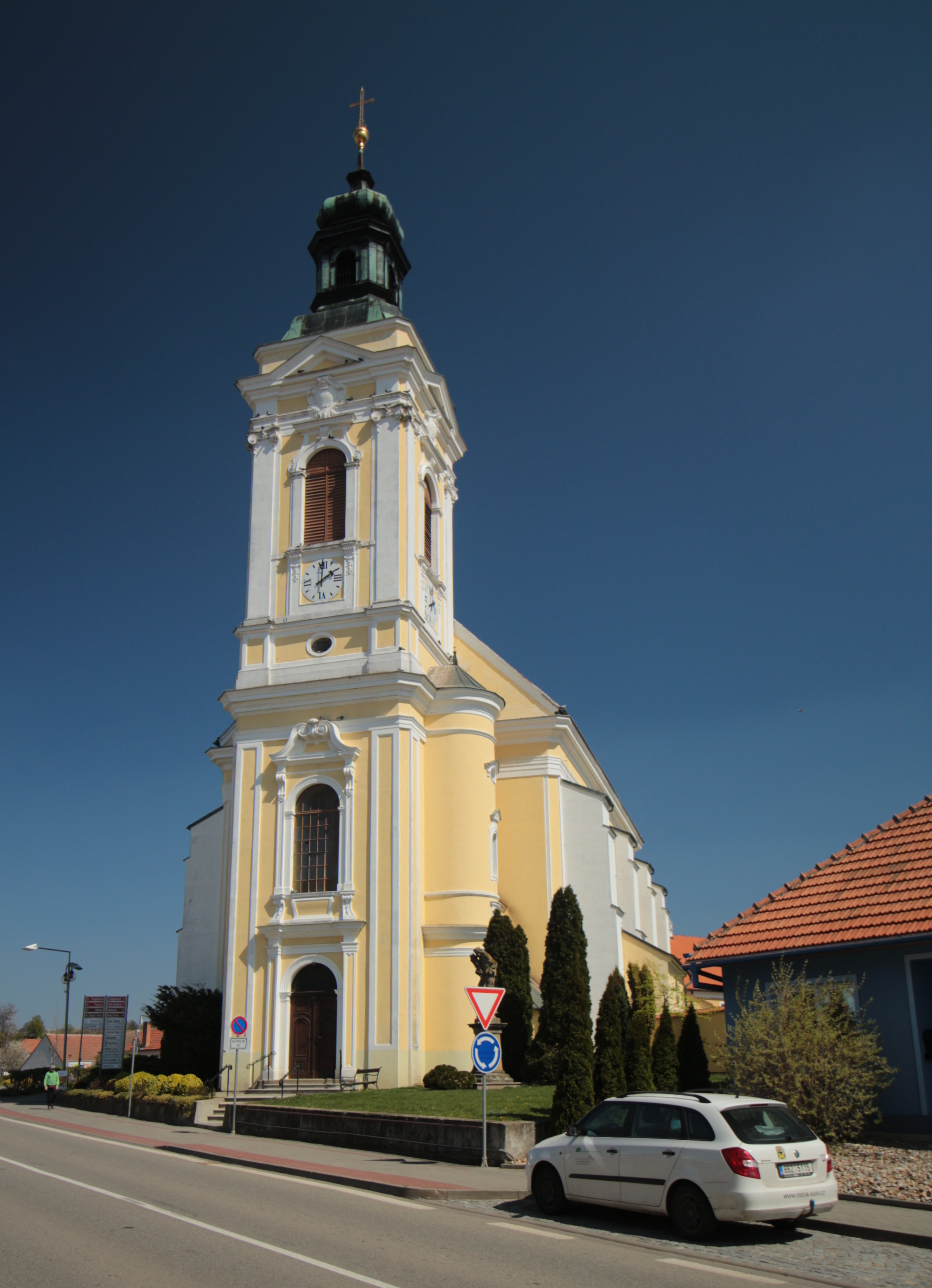 Čejkovice, kostel sv. Kunhuty